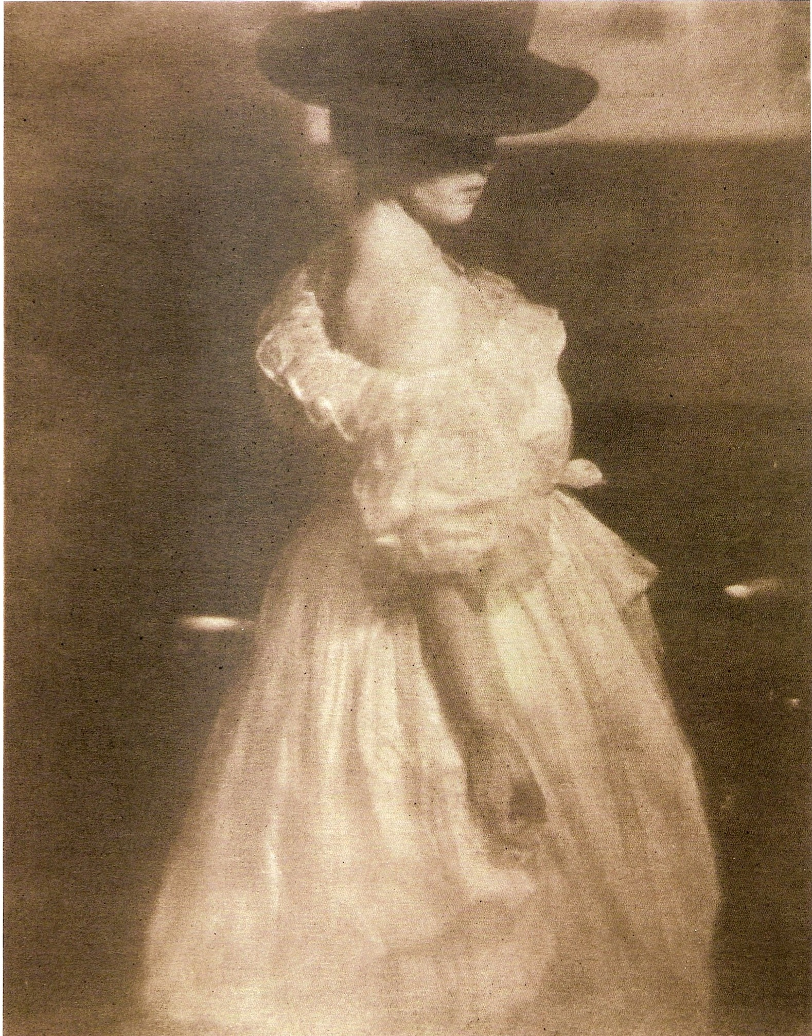 « Study in Tonal Values III, (Mary Warner) » 1908, par Heinrich Kuehn. Transfert de bromoil sur tissu